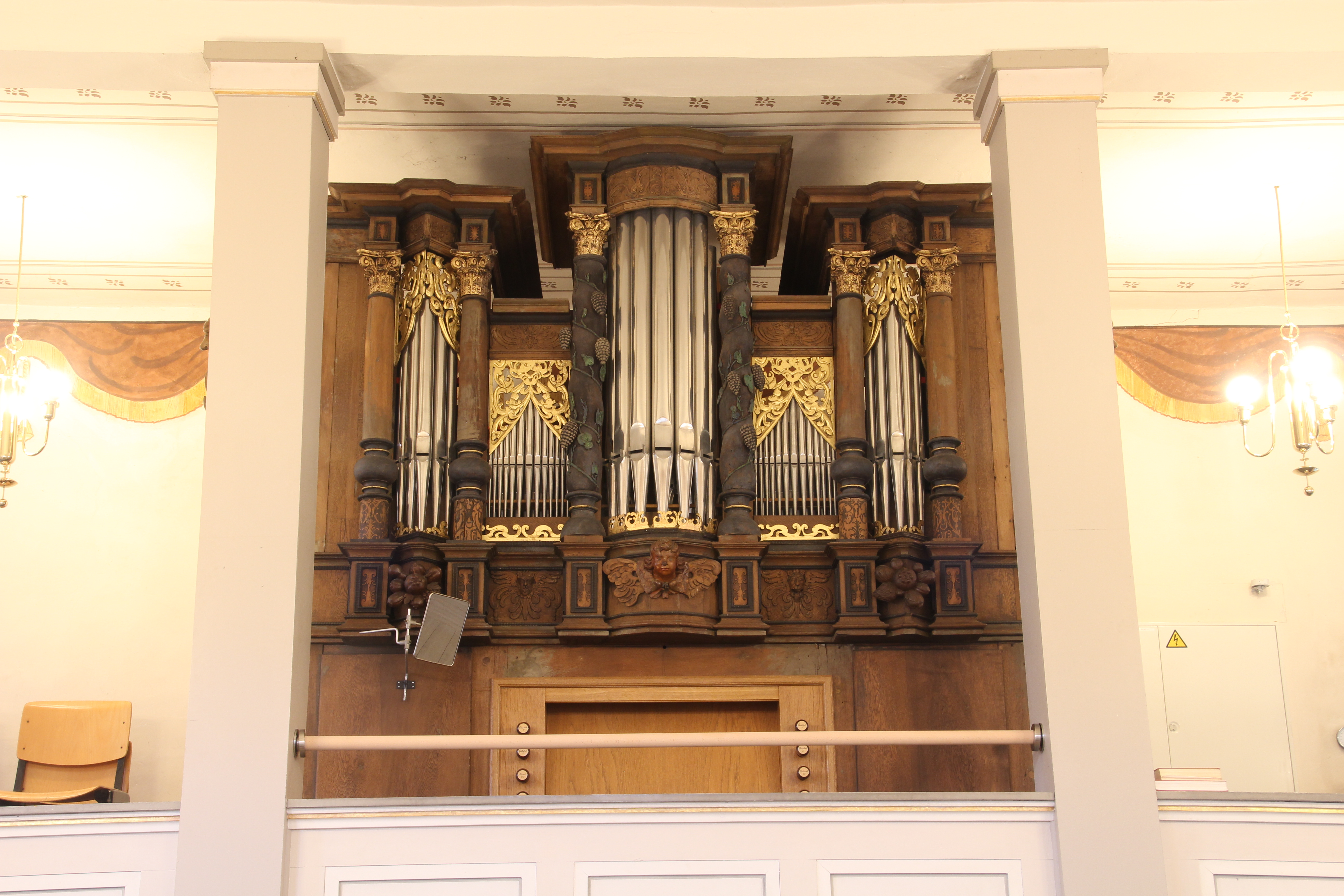 Siehe Bild und Dateiname